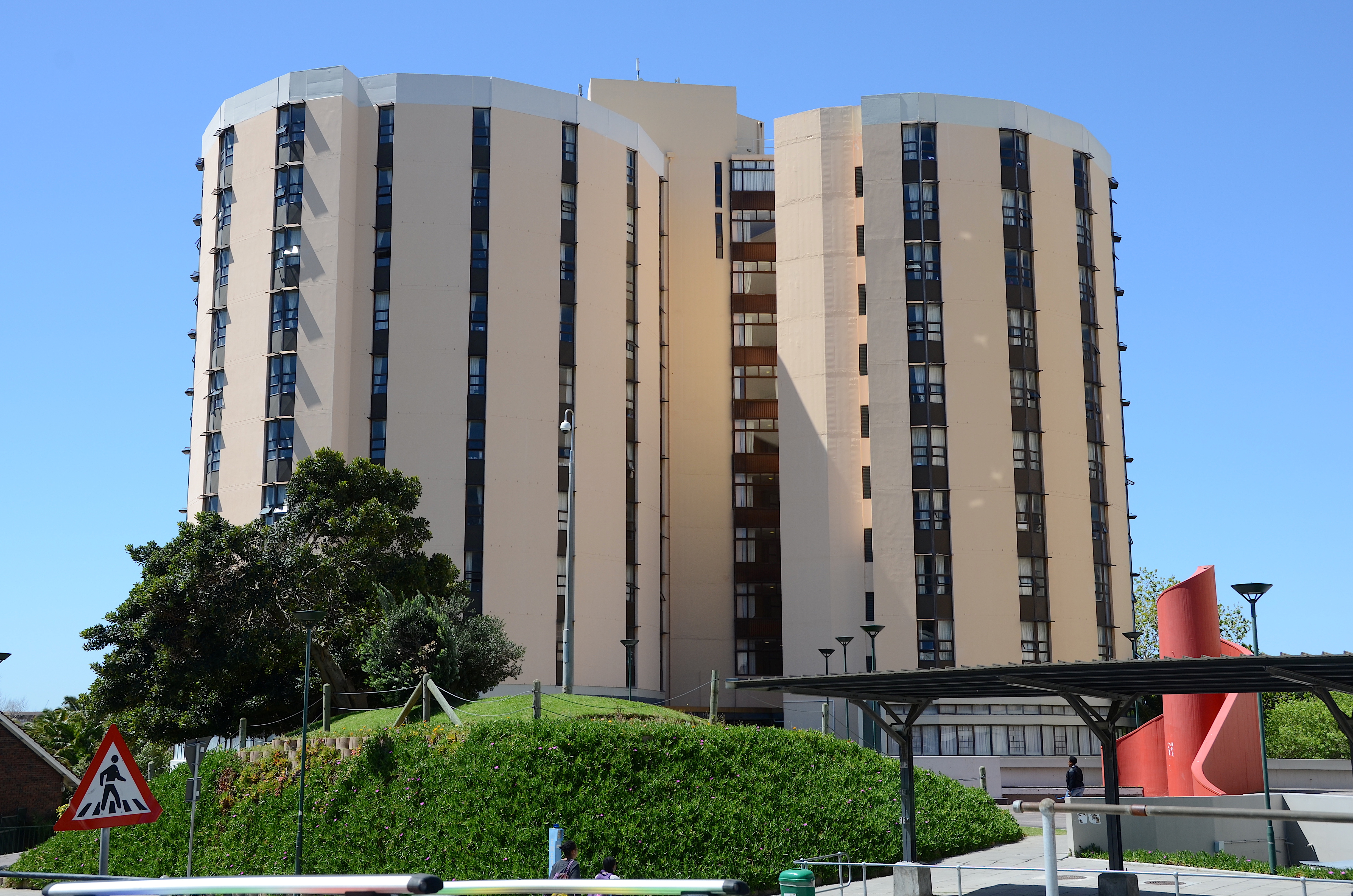 Tugwell Hall in Rosebank, Kapstadt (Südafrika)